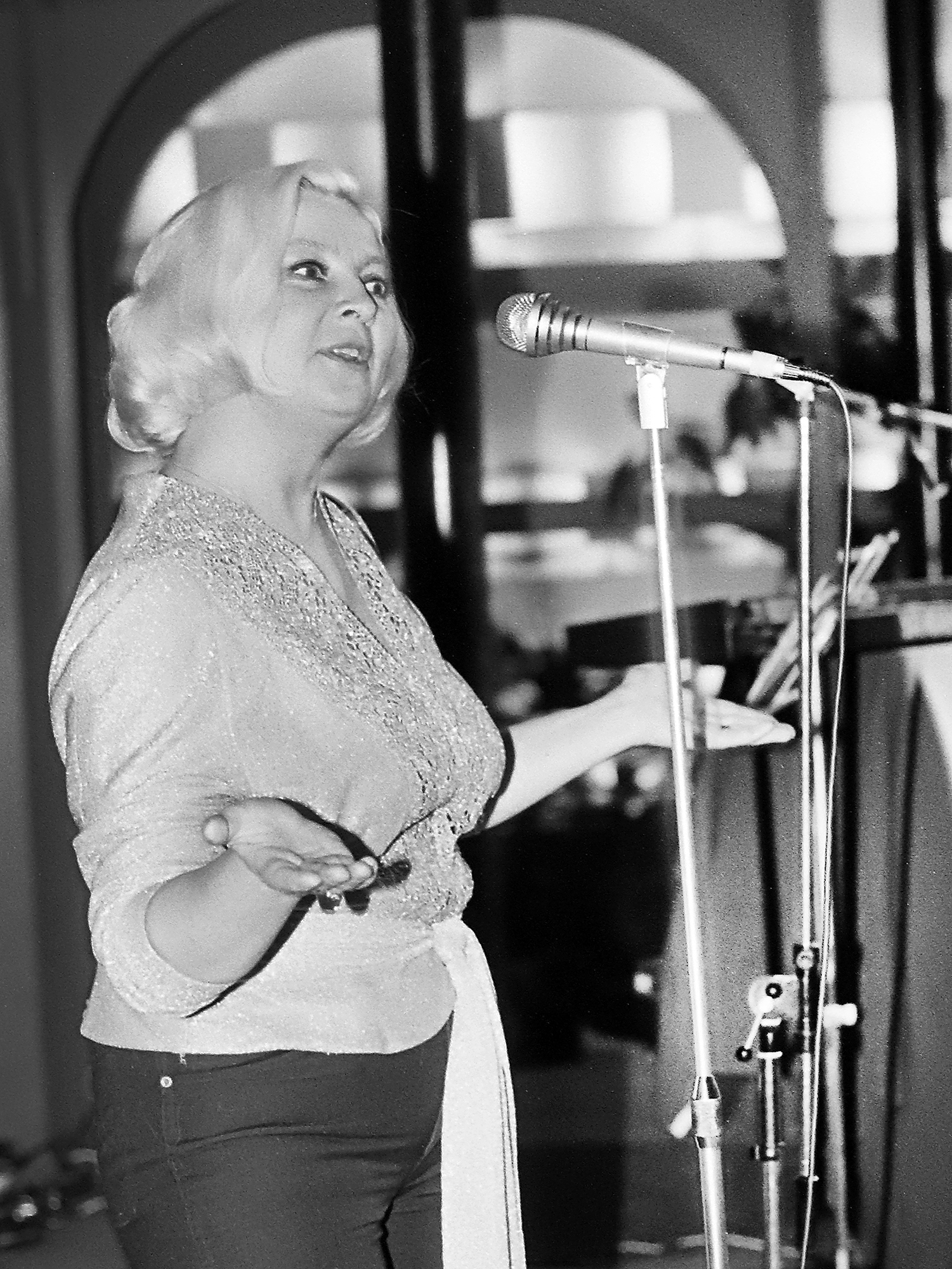 Ada Lundver, filmi- ja estraadinäitleja Lillepaviljonis 85